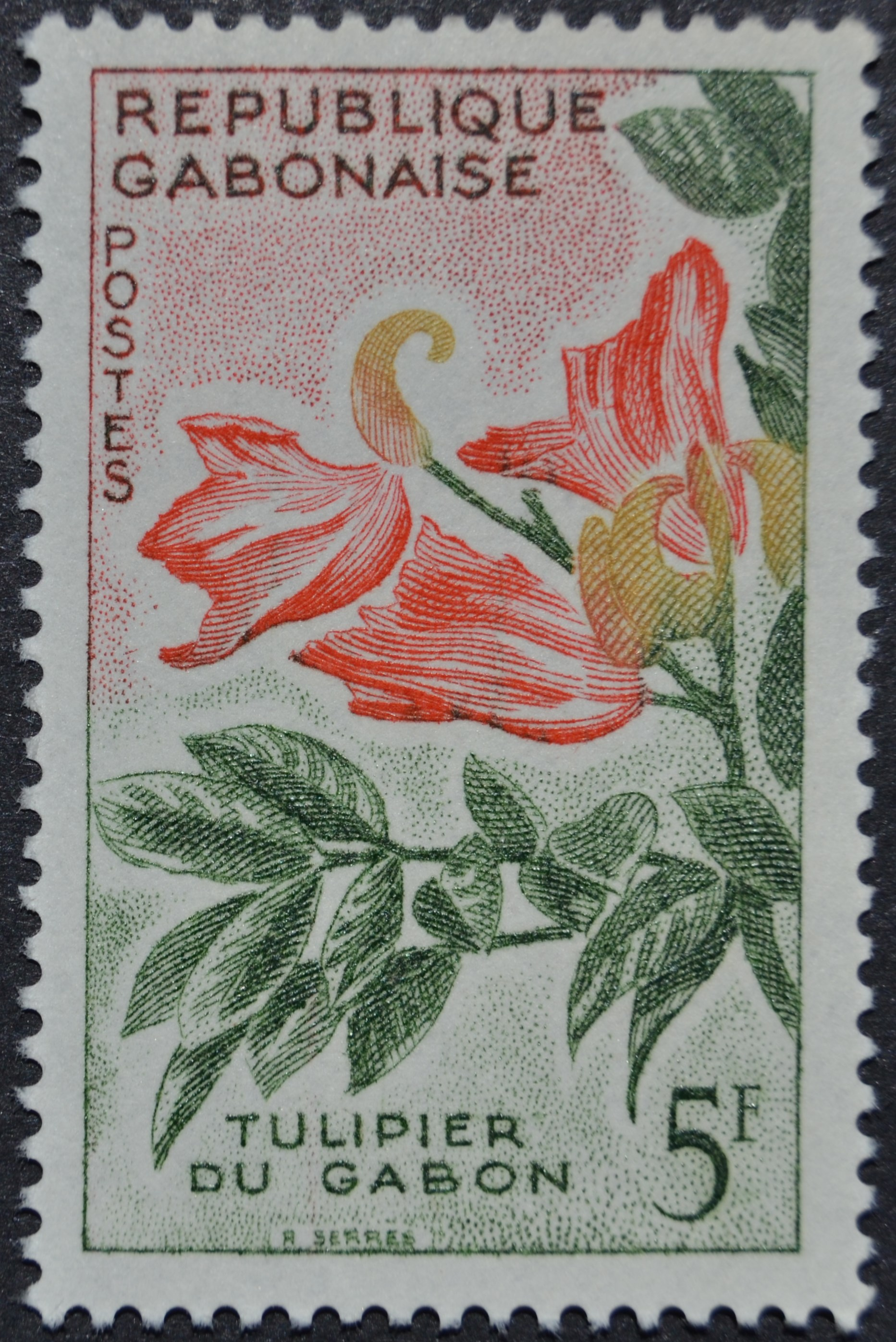 Selo do Gabão, da série "Flores", emitida em 1961, com o valor facial de 5 fr.